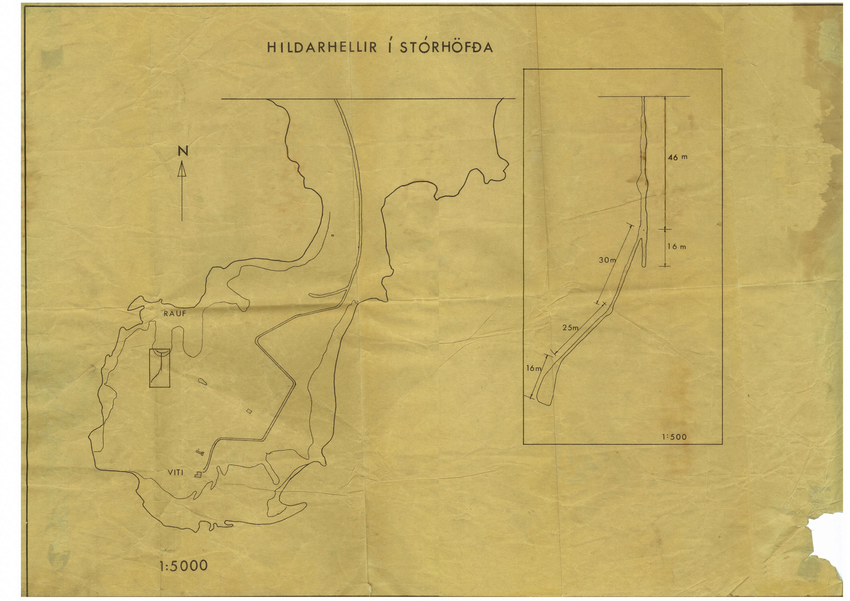 Hildarhellir í Stórhöfða